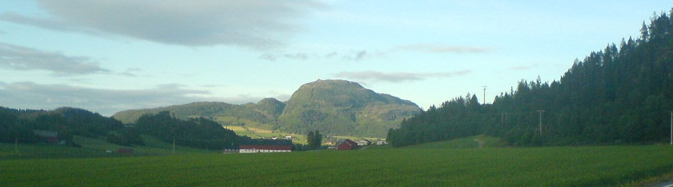 Forbordsfjellet sett fra Rykkja/Røkke, med Røkkesdalen i forgrunnen.